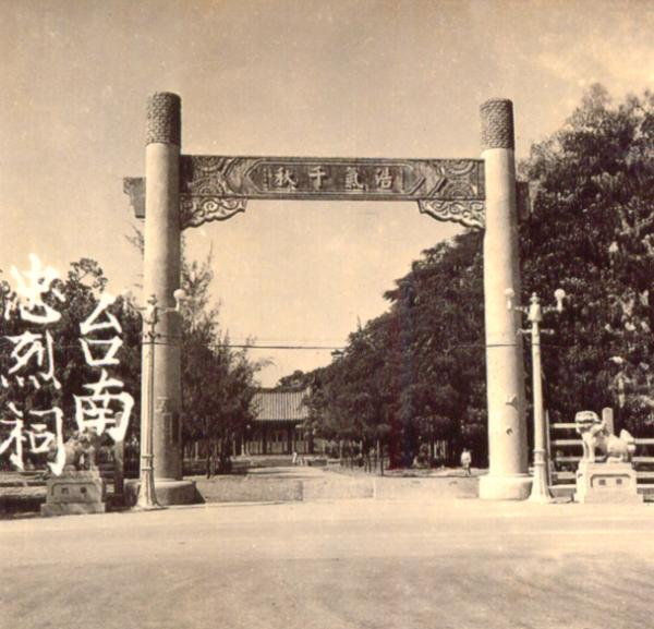 第二次世界大戰後改建成忠烈祠的台南神社